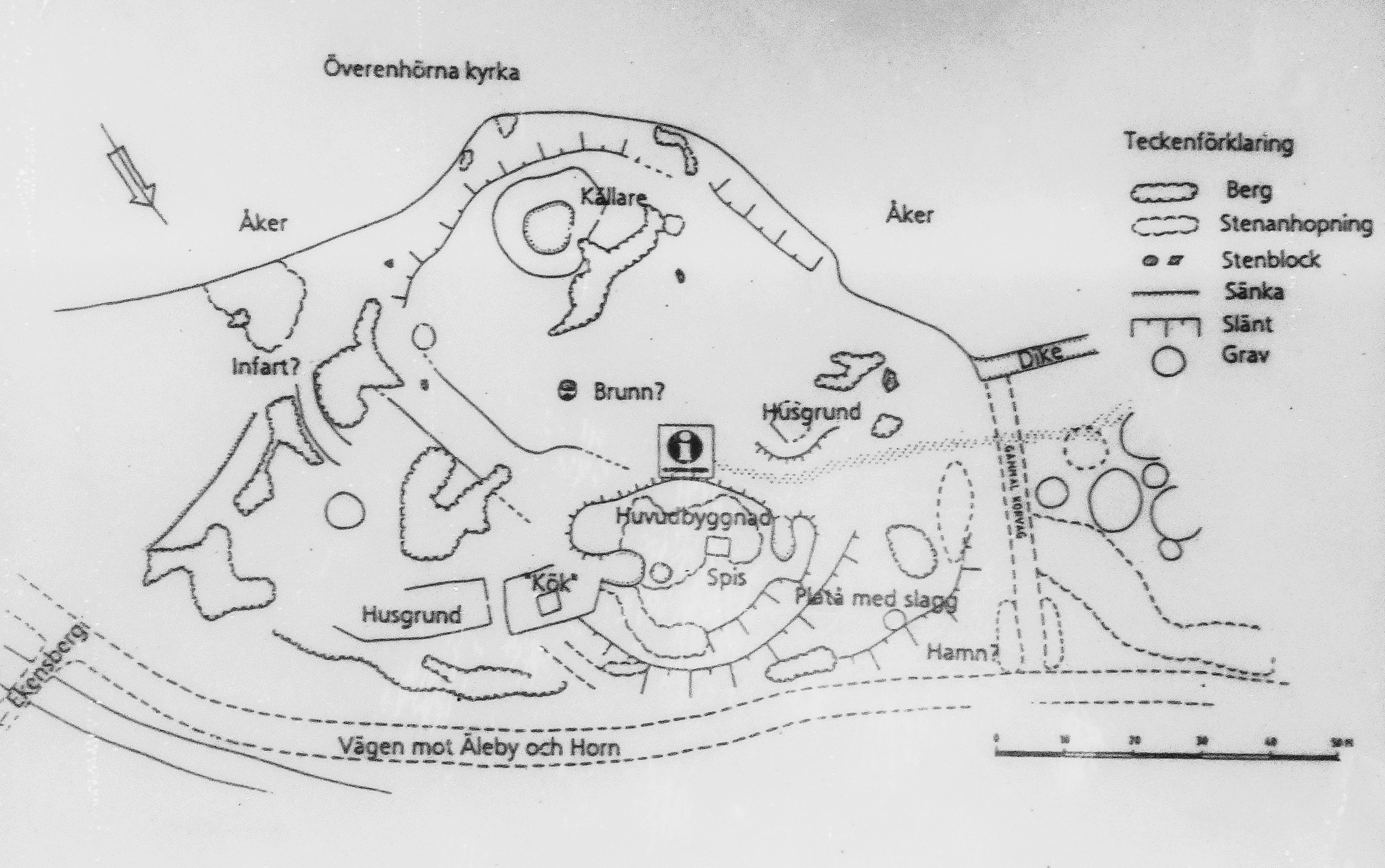 Karta över Husaby-Enhörna kungsgård